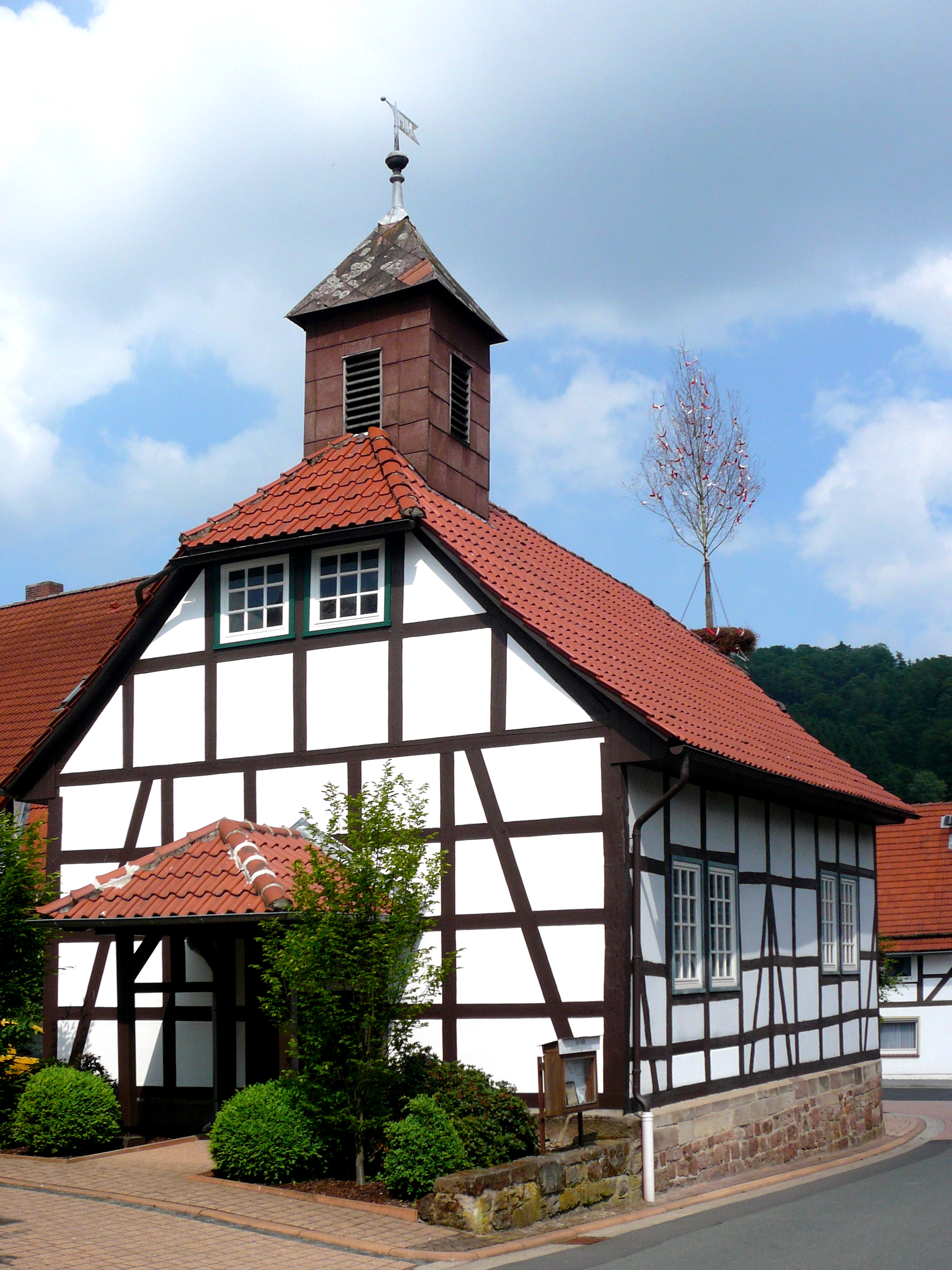 Fachwerkkapelle in Uslar-Delliehausen, Landkreis Northeim, Südniedersachsen. Erbaut 1748, umgebaut 1904. Blick von Südwesten